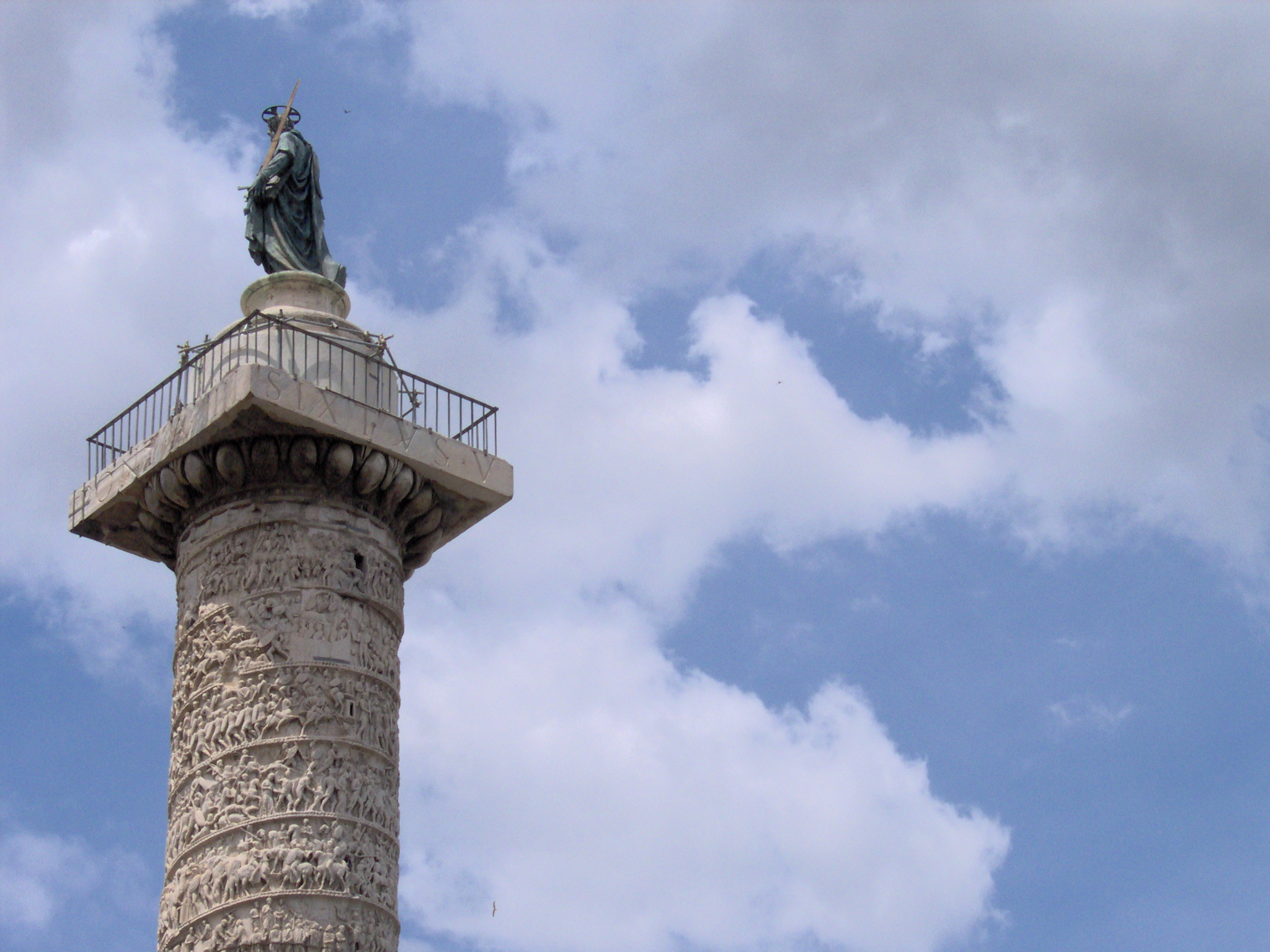 Piazza Colonna - Particolare